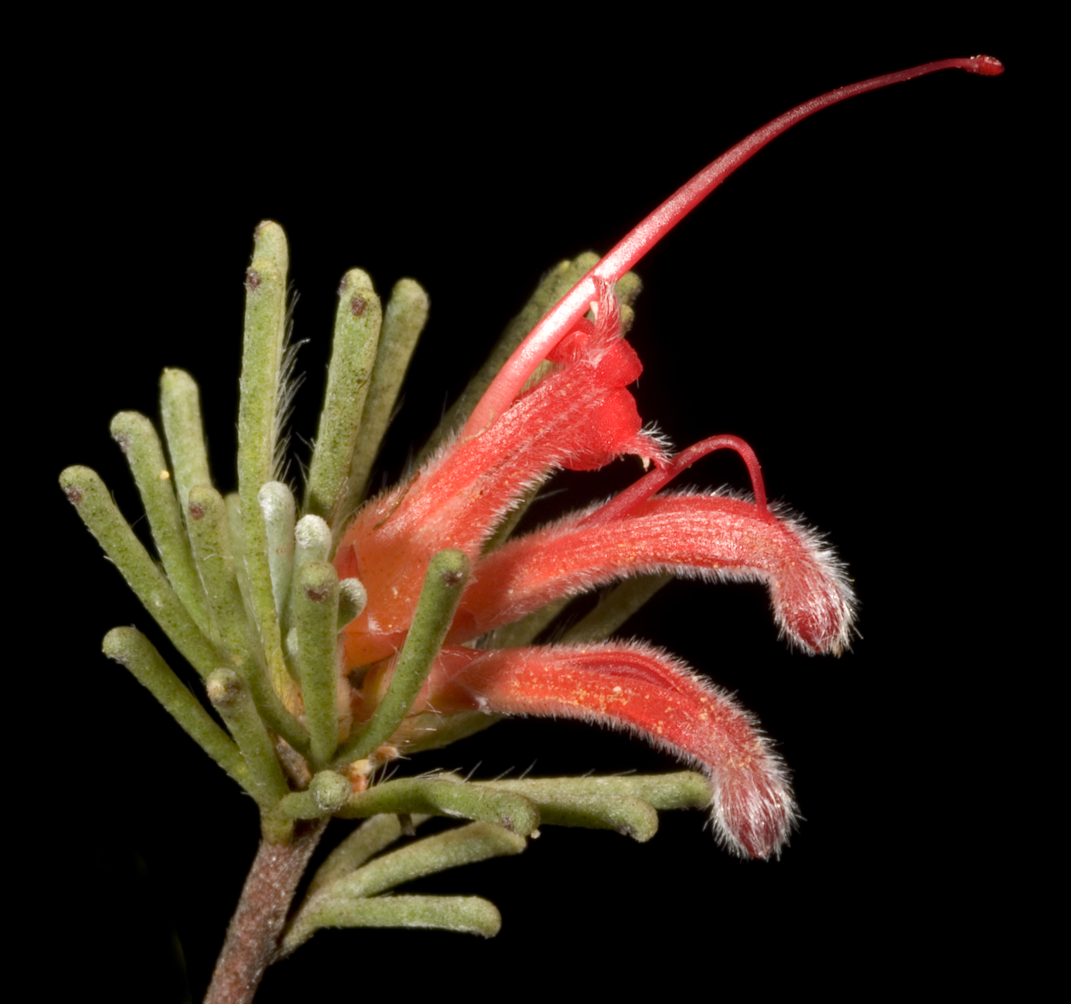 KRT3537